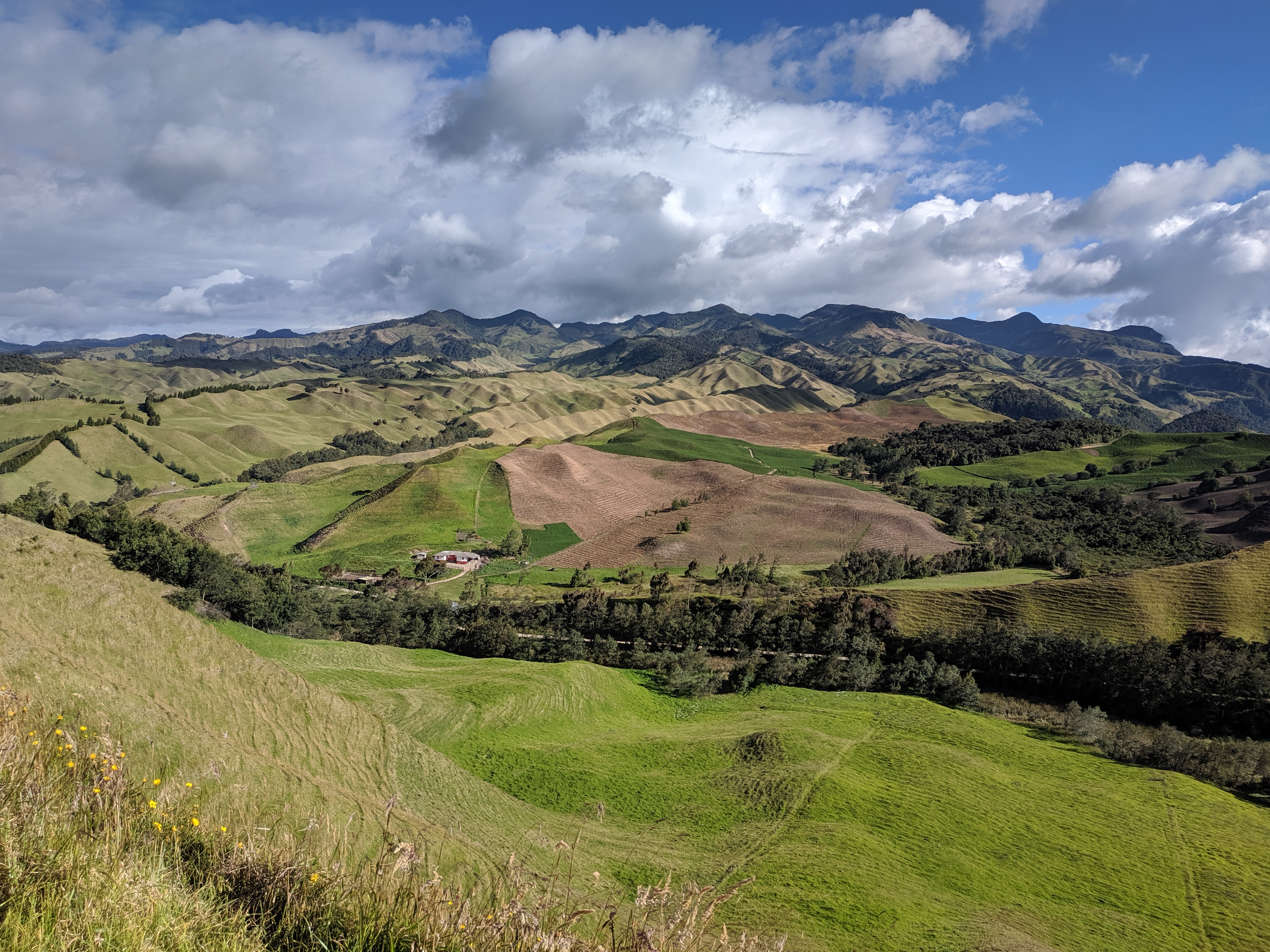 Nacimiento del Río Guarinó. Vereda Páramo ( Marulanda - Caldas - Colombia)